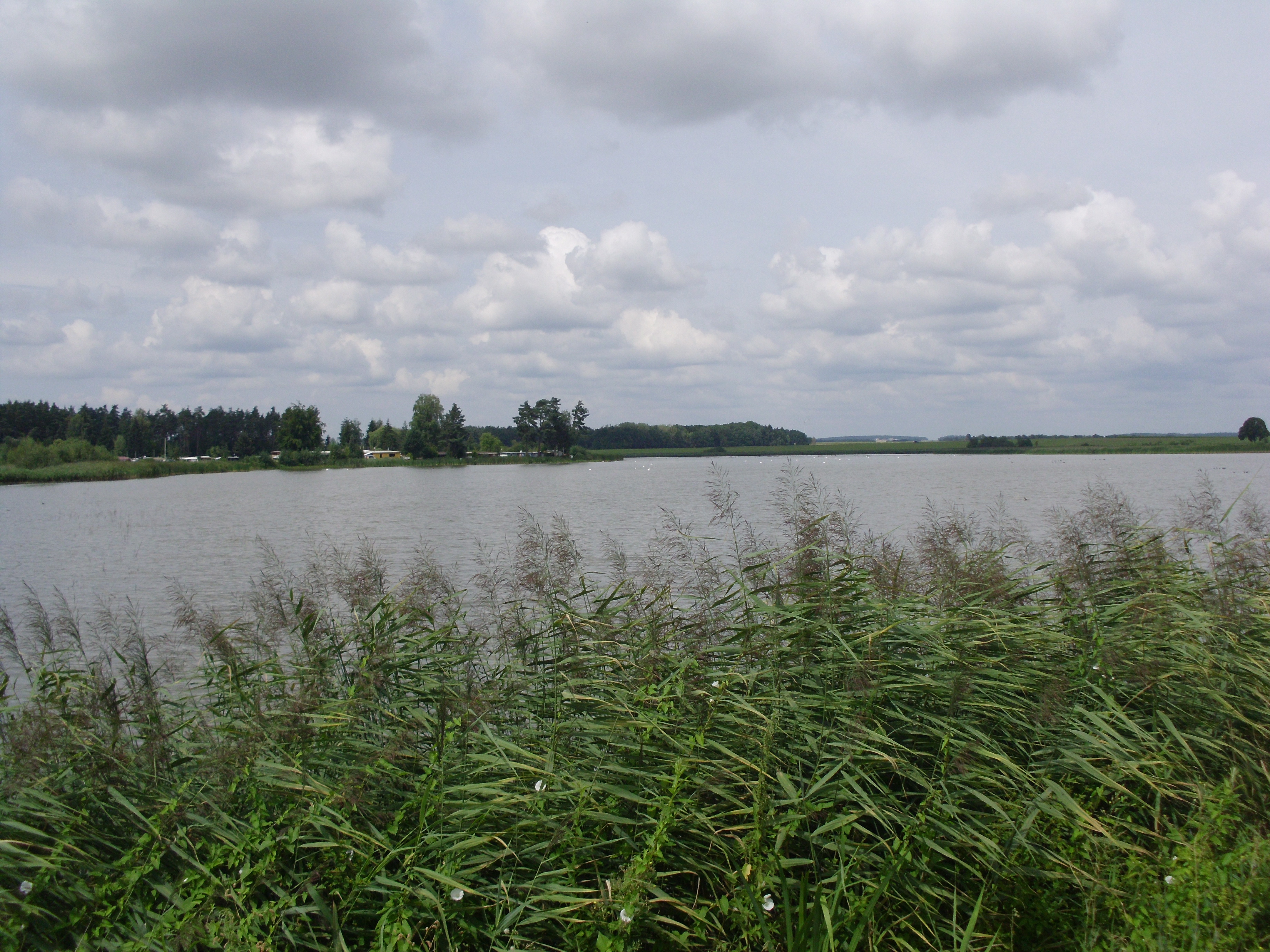 Kauerlacher Weiher bei Kauerlach, Ortsteil von Hilpoltstein im mittelfränkischen Landkreis Roth